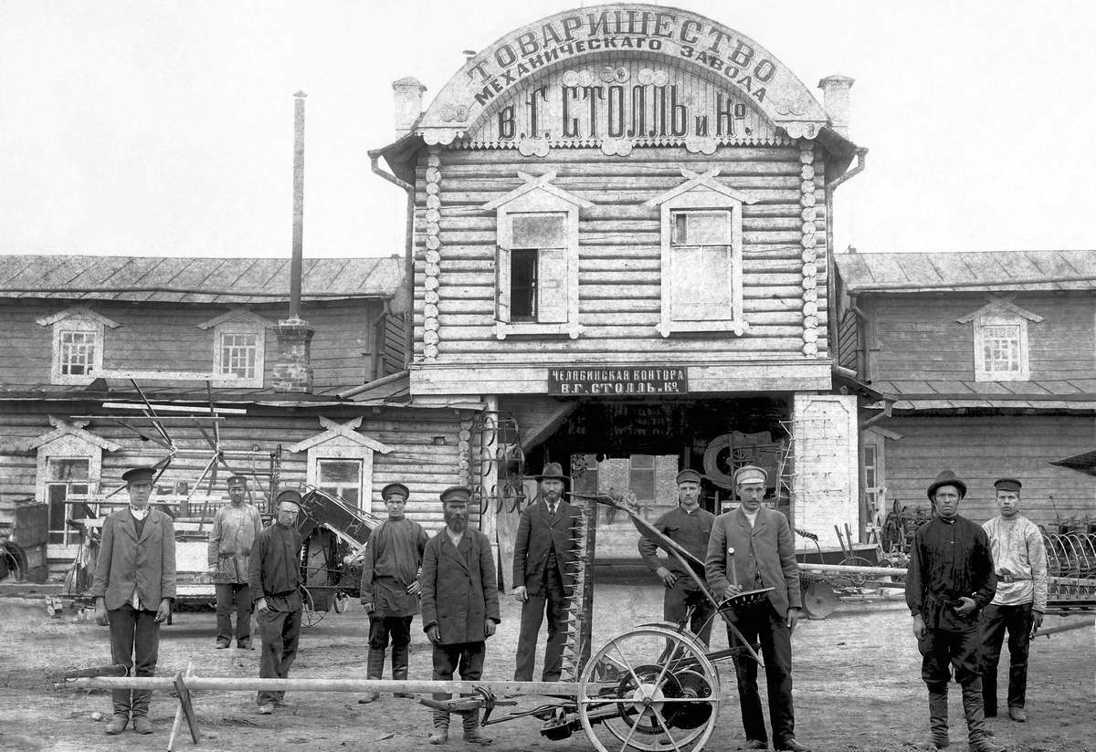 Механический завод «В. Г. Столль и К°». Челябинская контора товарищества.